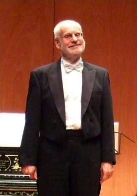 Ton Koopman, Paris, Cité de la Musique, 12 novembre 2008